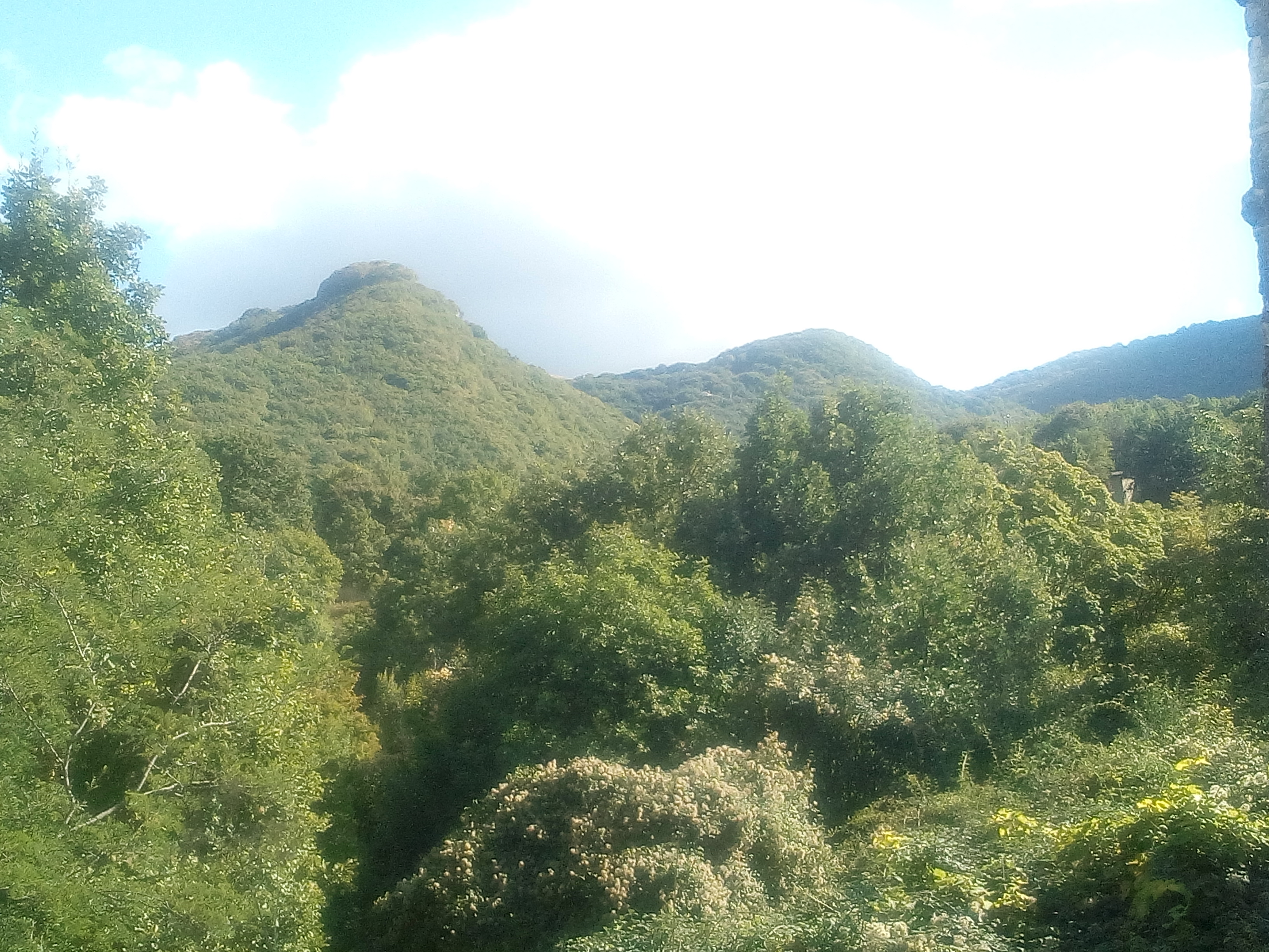 Catena dei monti Simbruini visti da Camerata Nuova